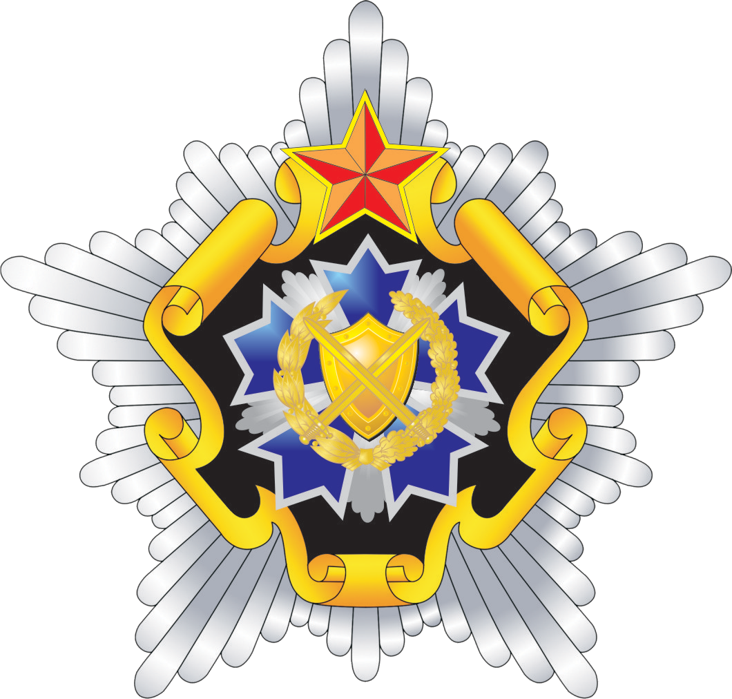 Эмблема, Управление территориальной обороны Генерального штаба Вооруженных Сил Республики Беларусь